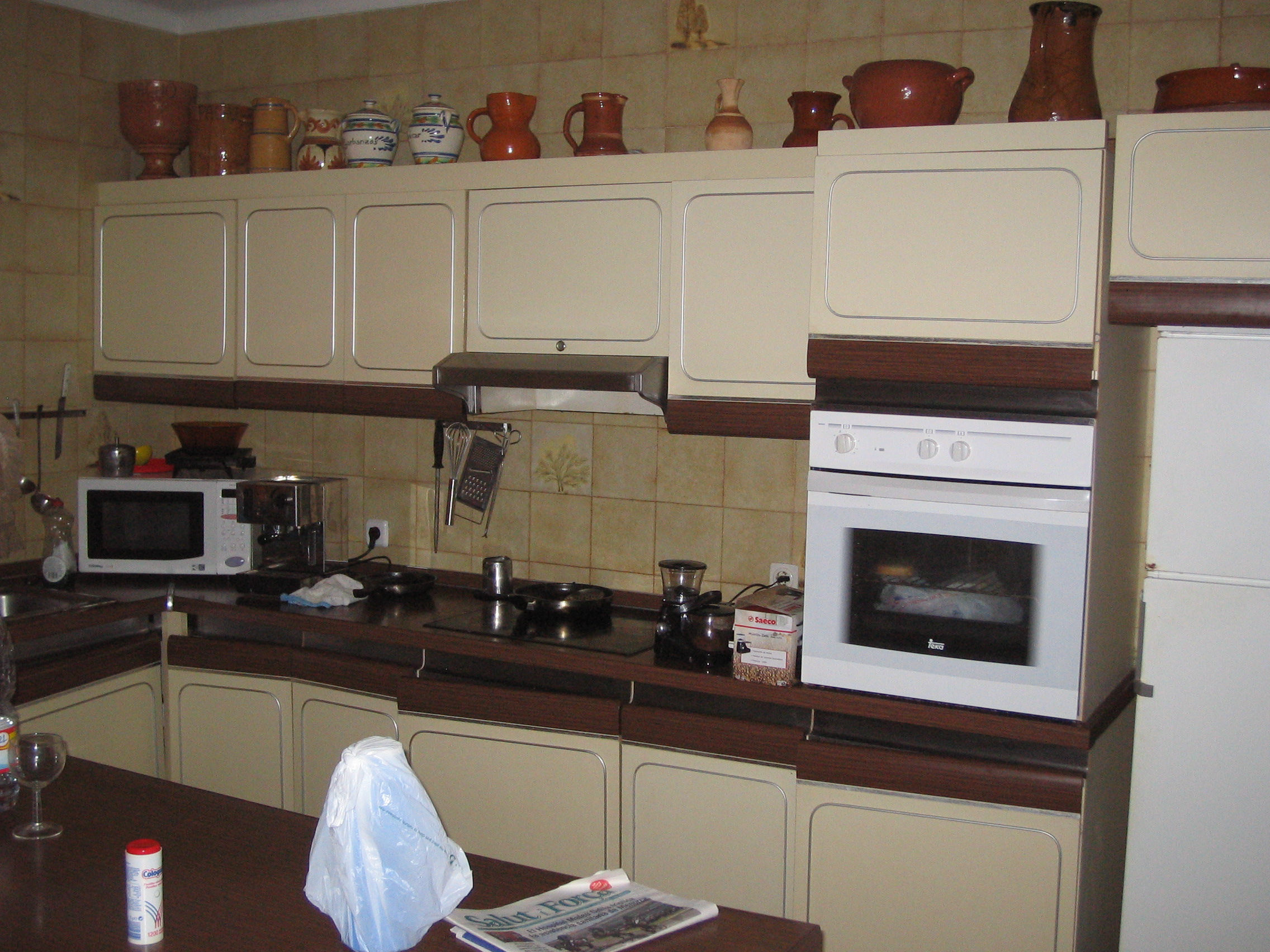 A kitchen